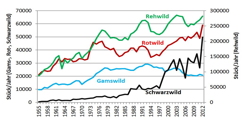 Jährliche Jagdstrecke von Reh-, Rot, Gams- und Schwarzwild in Österreich 1955-2012, basierend auf einem Vortrag von Friedrich Reimoser 2014